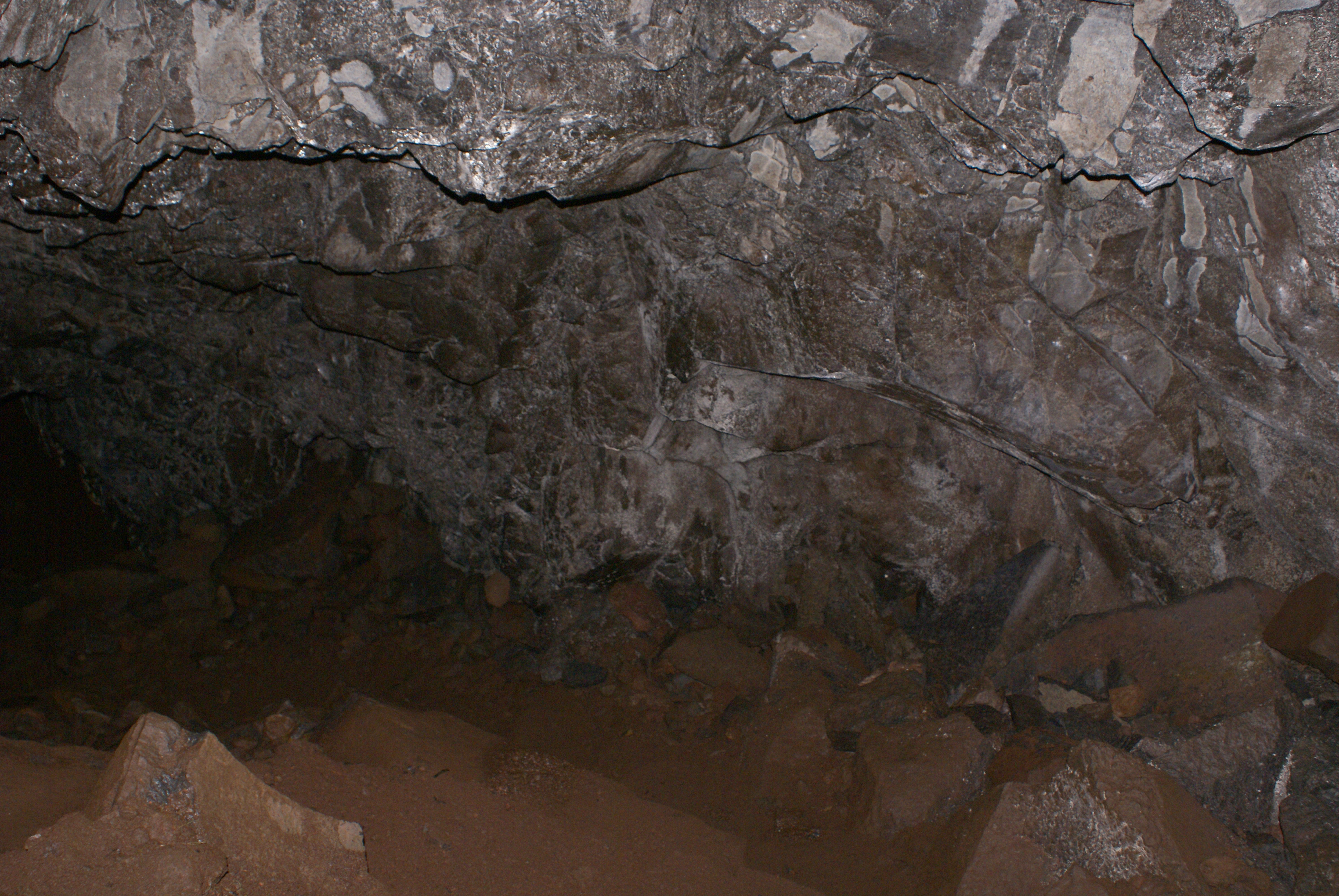 Furna do Poio, Caldeira de Santo Cristo, Calheta, ilha de São Jorge